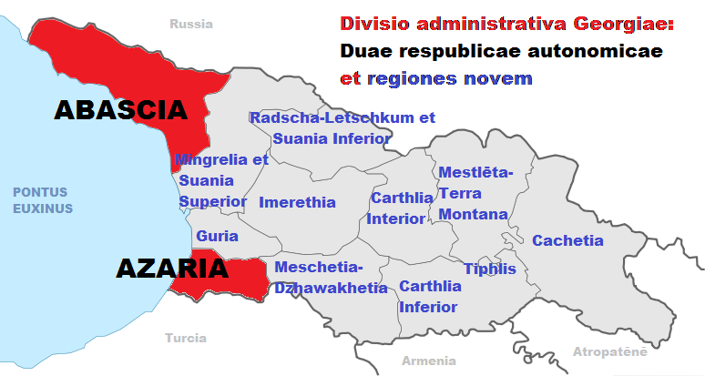 Divisio administrativa Georgiae